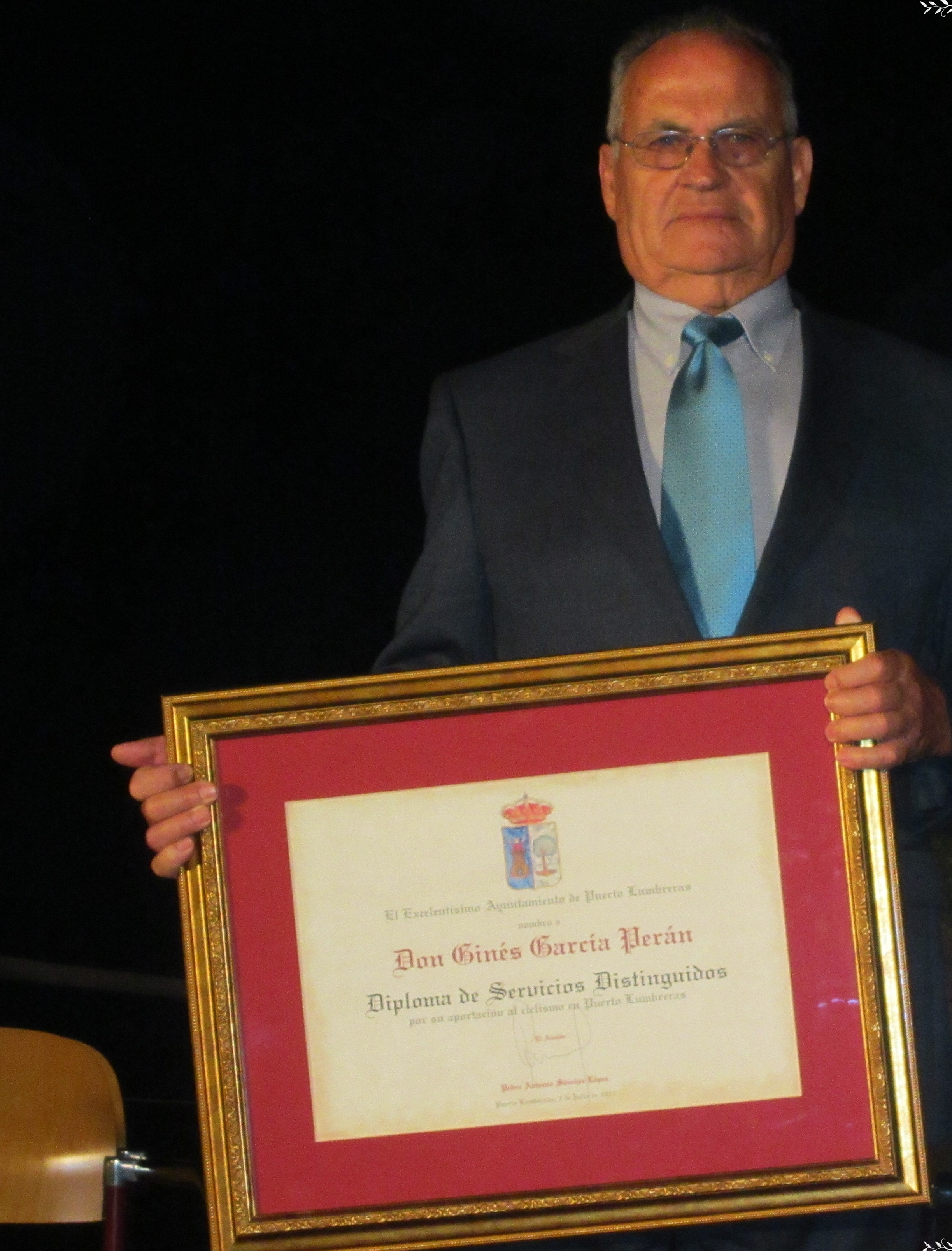 Gines Garcia en uno de sus homenajes concedido por su ciudad.(2012)